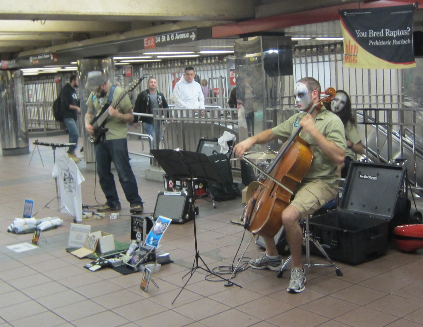 Concierto en el metro